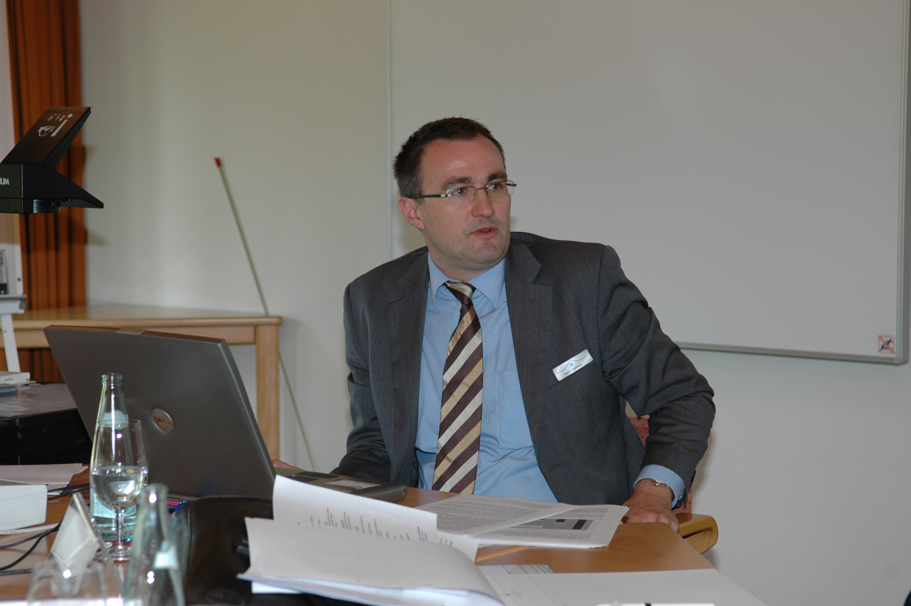 Martin Baltisser an einem Kolloquium im Lilienberg Unternehmerforum